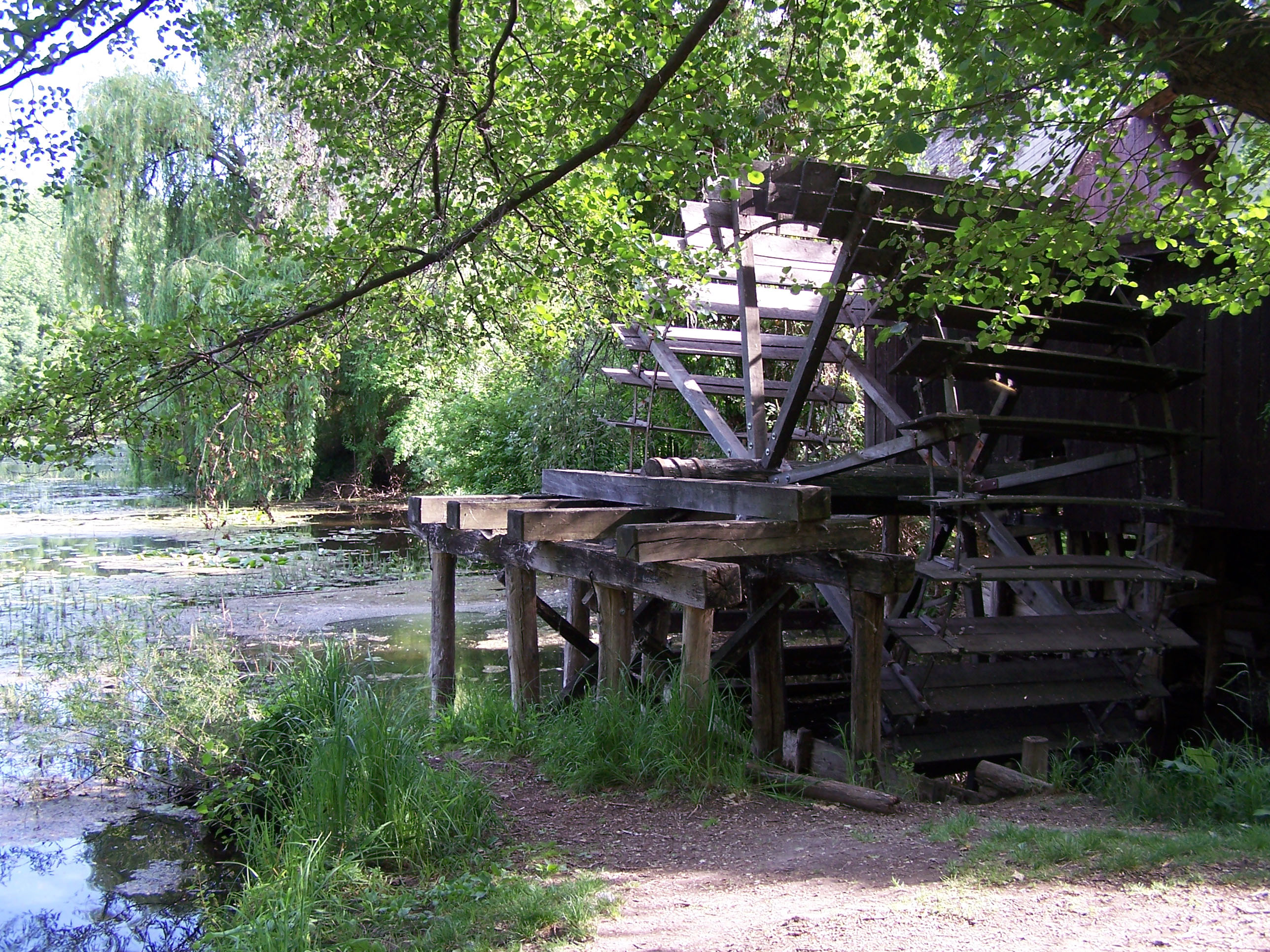 Water mill in Dunajský Klátov (Dunatőkés), Slovakia